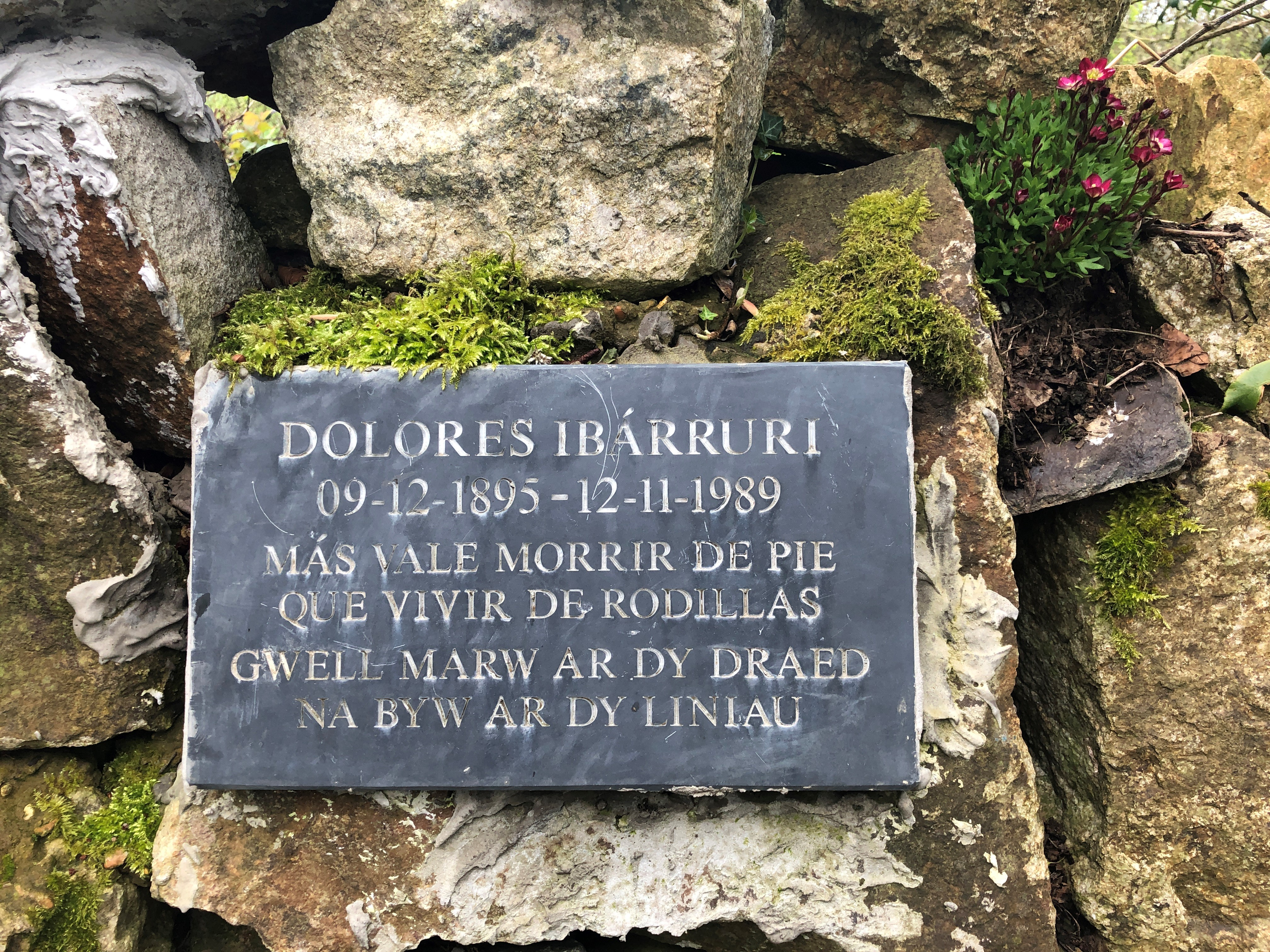 Cofeb syml i Dolores Ibarruri yn Nhudweiliog, Pen Llyn, Gwynedd, un o ddim ond dau cofeb iddi, y llall yn gerflun ohoni'n Glasgow, yr Alban.